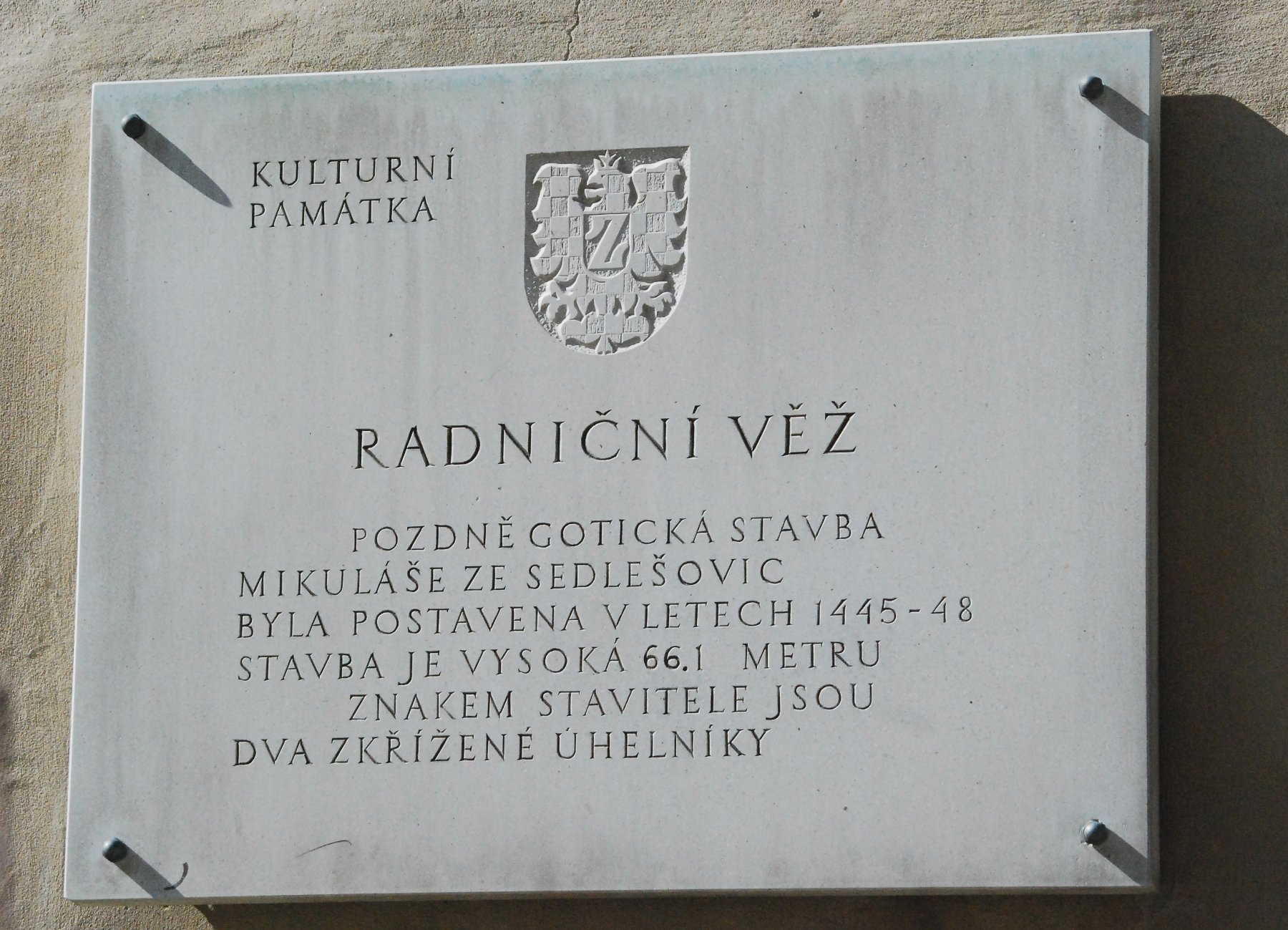 Tafel, die den Znaimer Rathausturm als Kulturdenkmal ausweist.